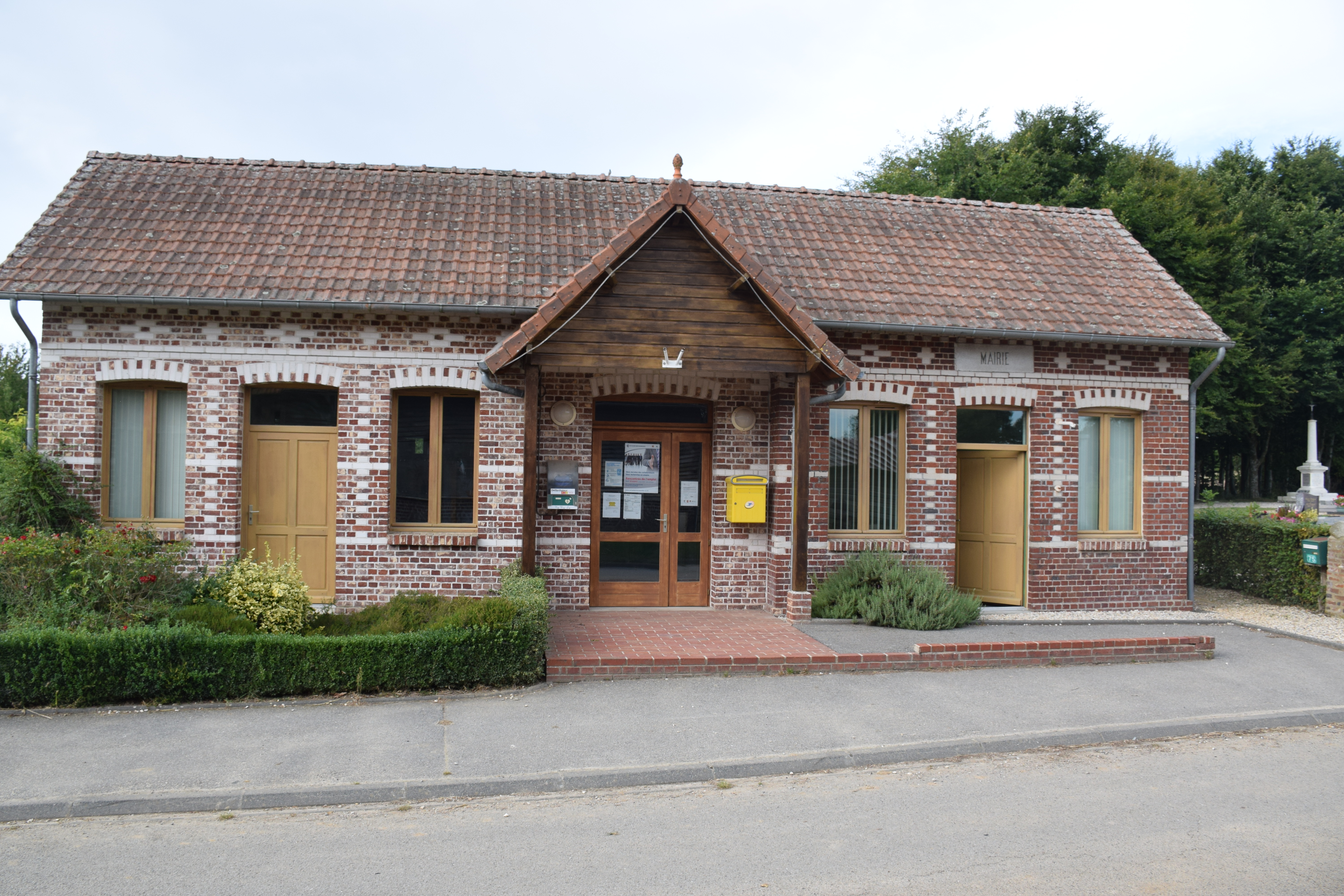 Mairie